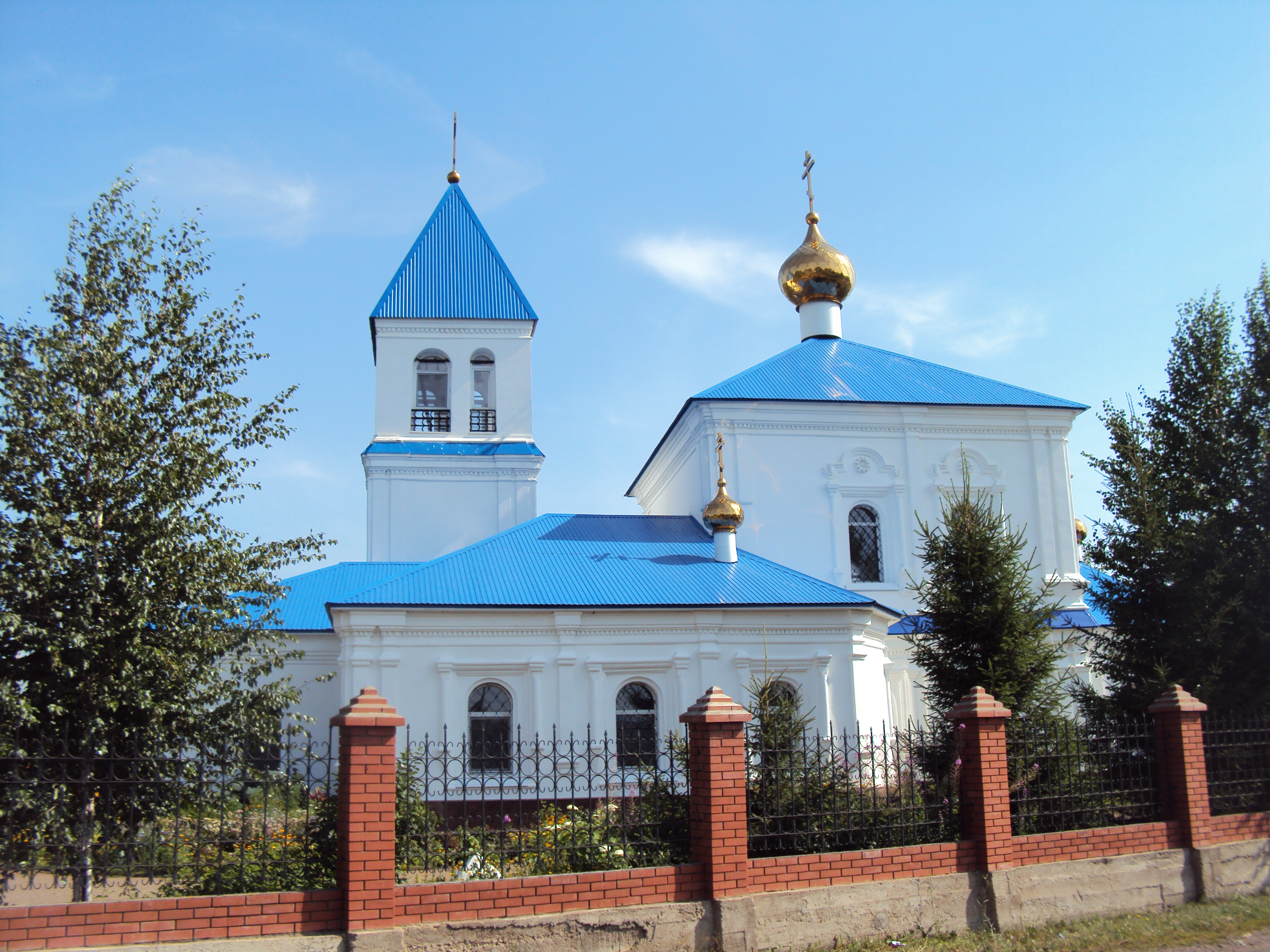 Церковь Рождества Христова: Березовка, Уфимский район, Башкортостан